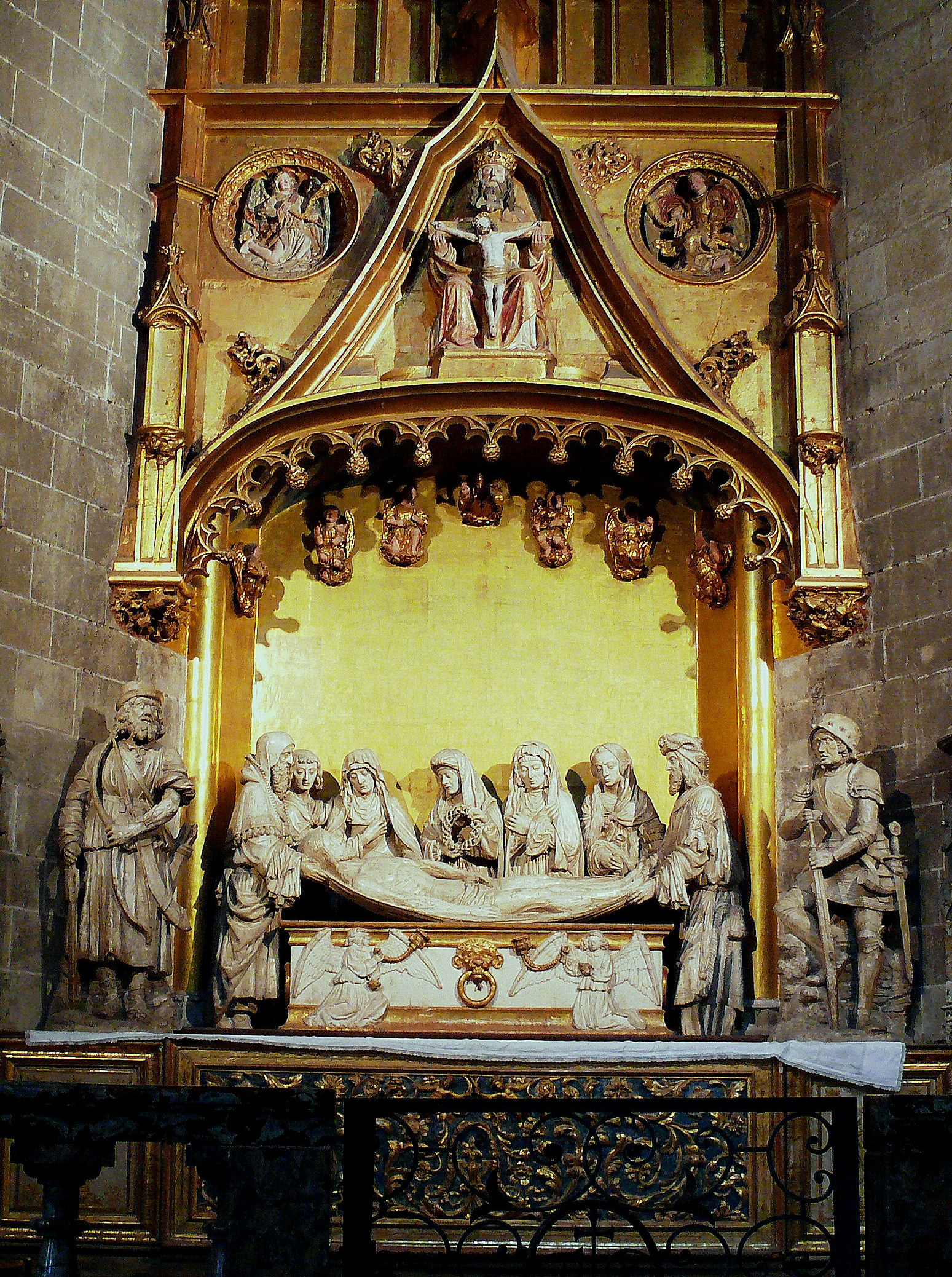 Cathédrale Sainte-Marie d'Auch - Mise au tombeau